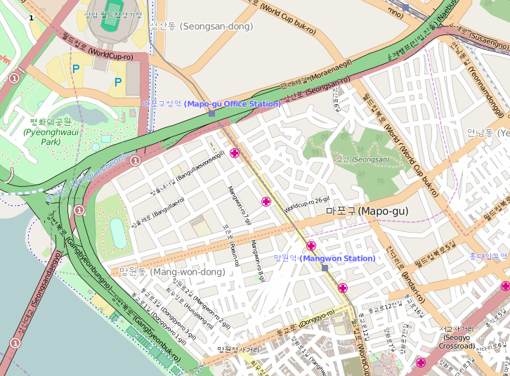 현재(2015년)의 지도에서 옛 홍제천의 흔적을 따라 동네길이 나 있는것을 볼 수 있다. 성산1동 경계(성산 동쪽과 남쪽의 분홍 점선)를 따라 동네길이 나 있으며 성산1동 왼쪽 망원동에도 망원역 왼쪽에 옛 홍제천의 흔적인 동네길이 나 있다. This map may be incomplete, and may contain errors. Don't rely solely on it for navigation.